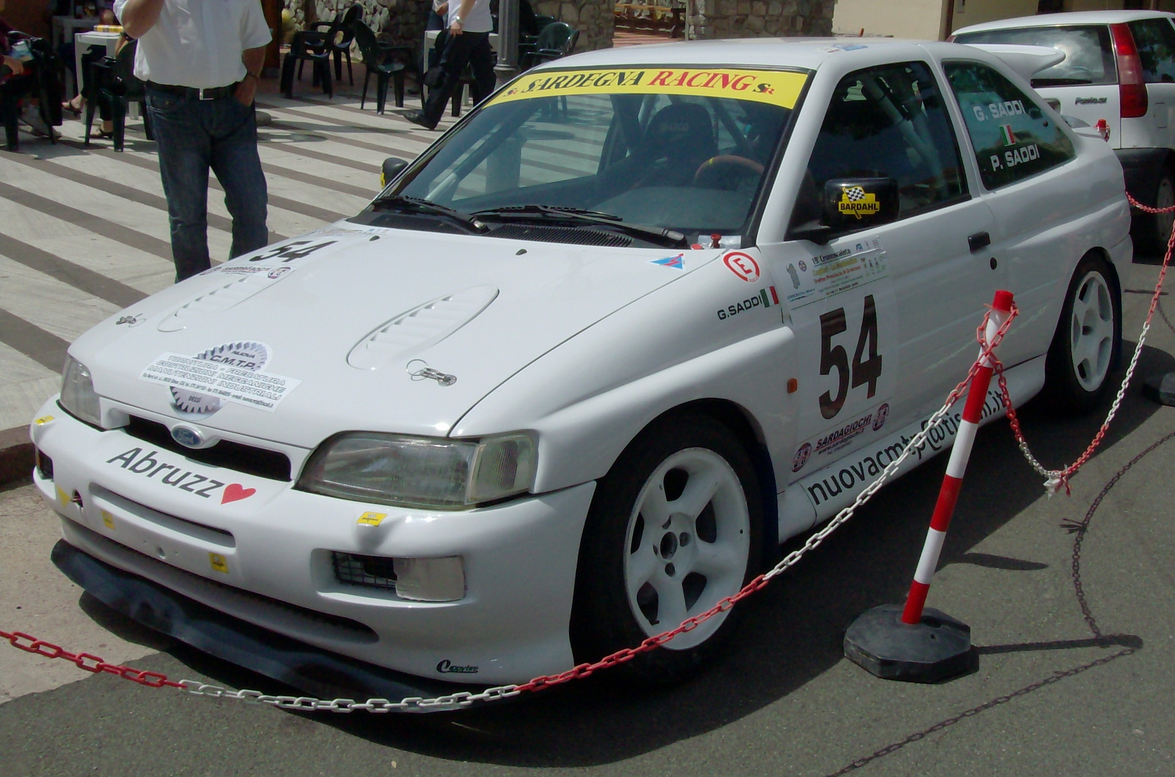 Cronoscalata Cuglieri-La Madonnina 2009